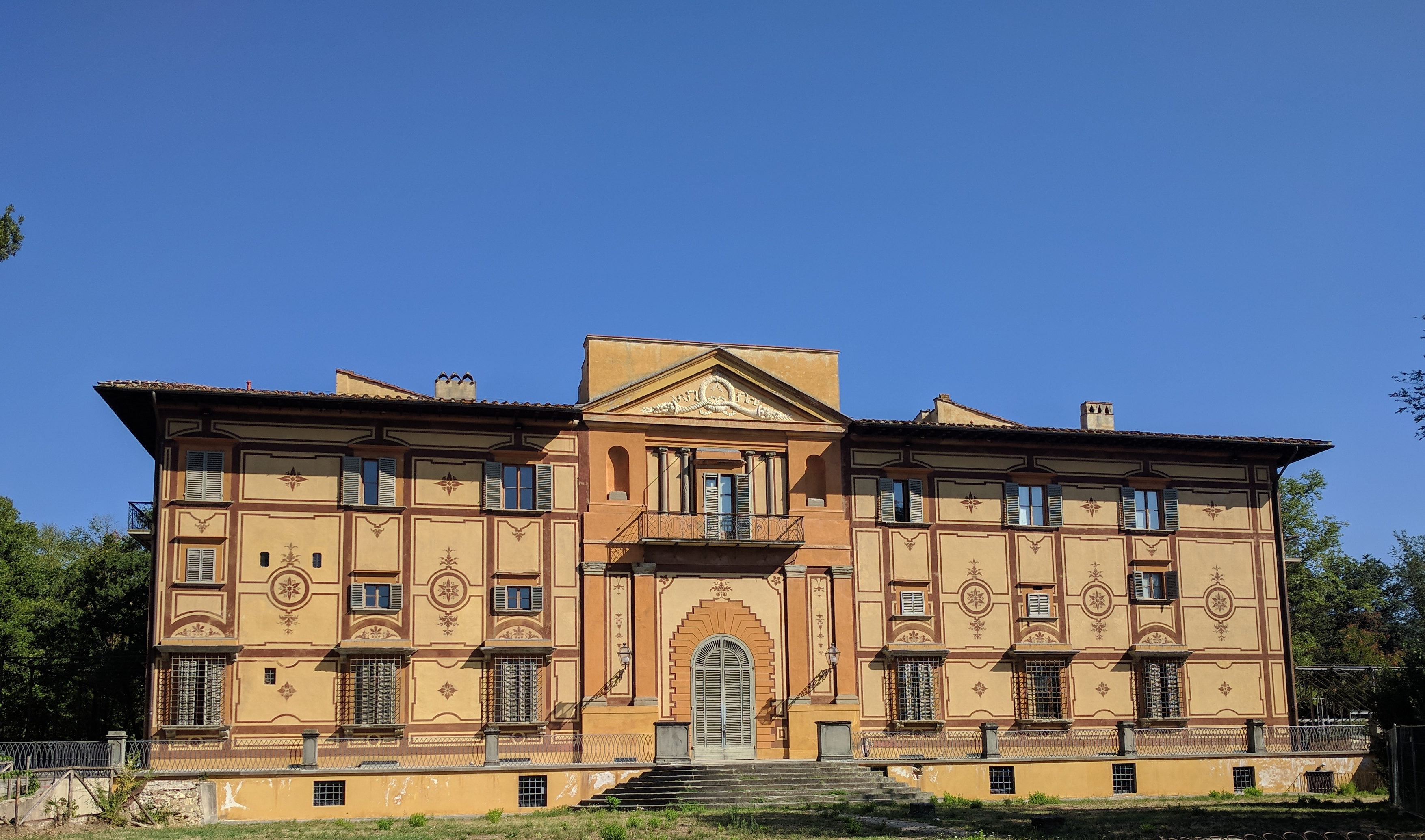 Villa Favart di Firenze, facciata lato sud